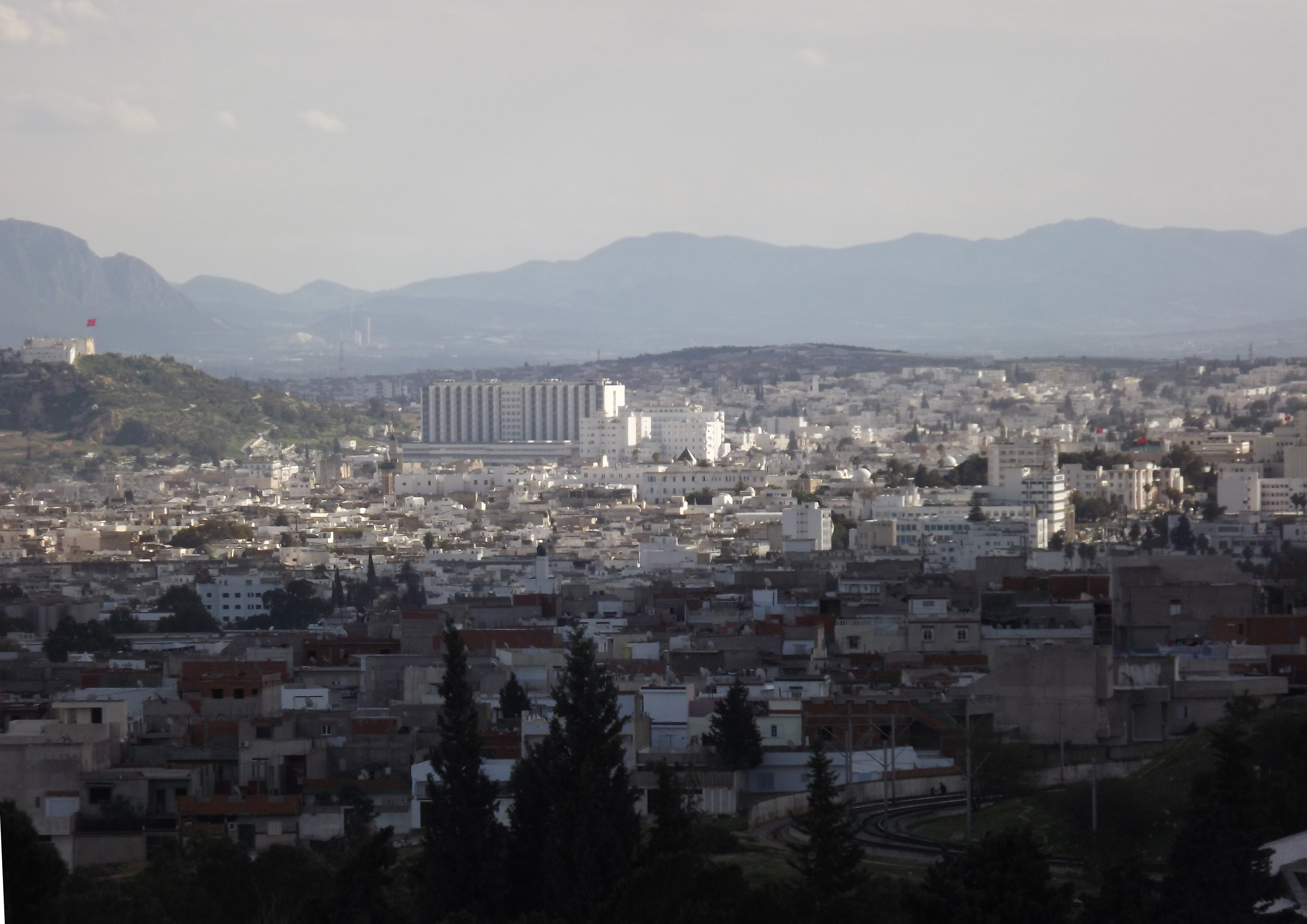 Vue panoramique de Tunis